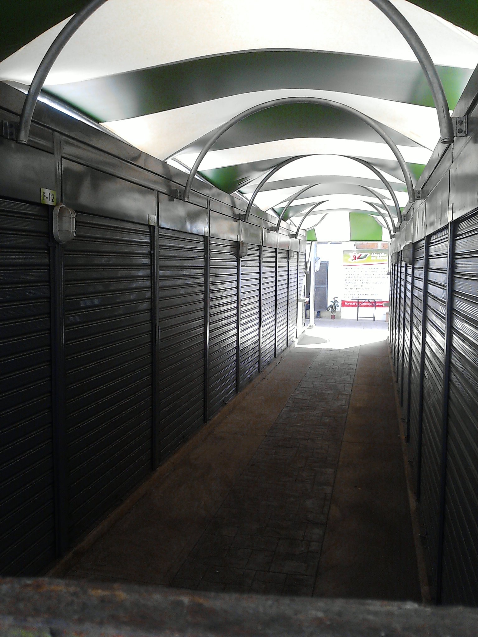 Mercado creado por la Alcaldía de Girardot durante la gestión del alcalde Pedro Bastidas para el comercio informal de Maracay.